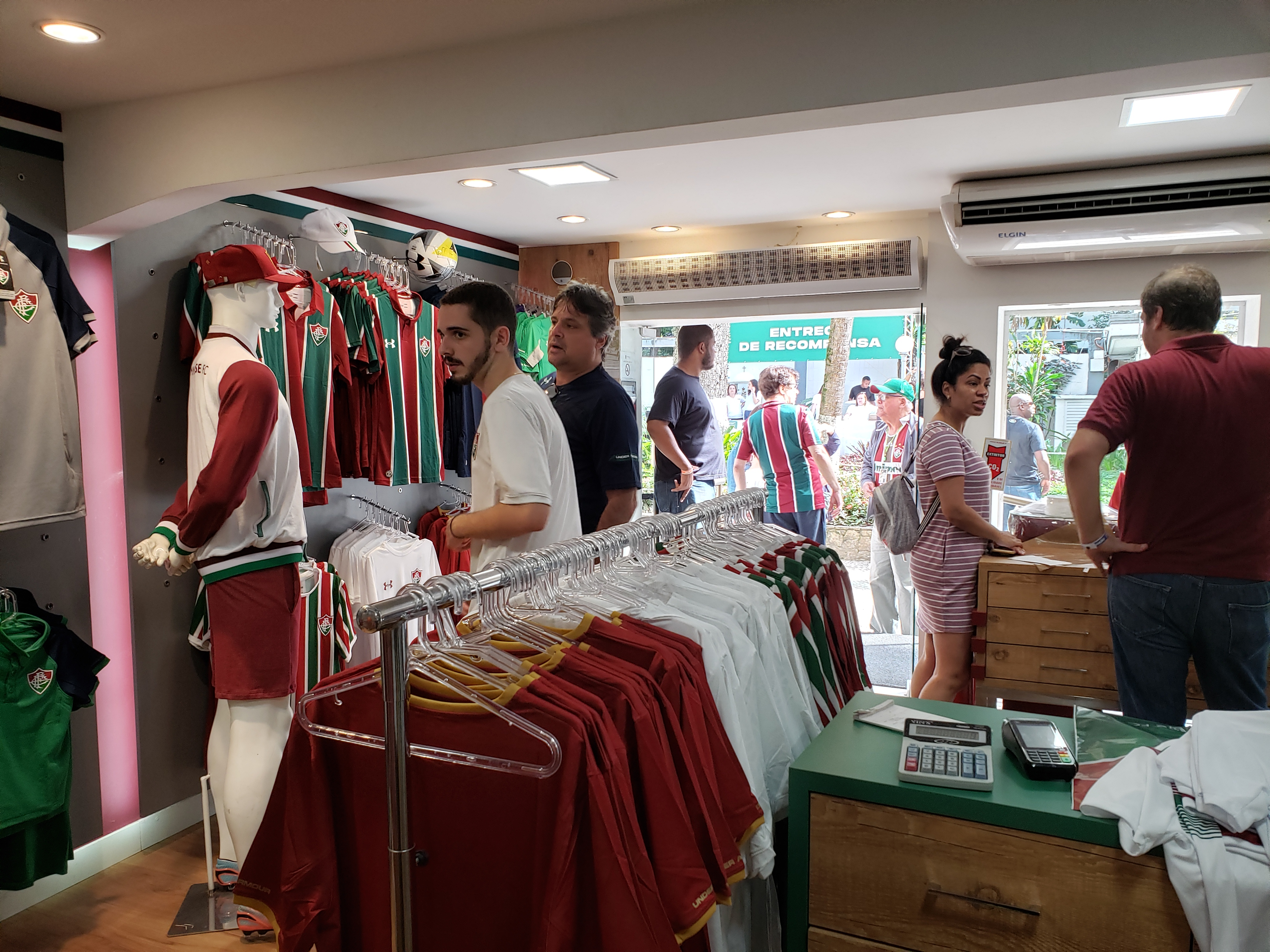 Torcedores comprando produtos na Loja do Fluminense Football Club.